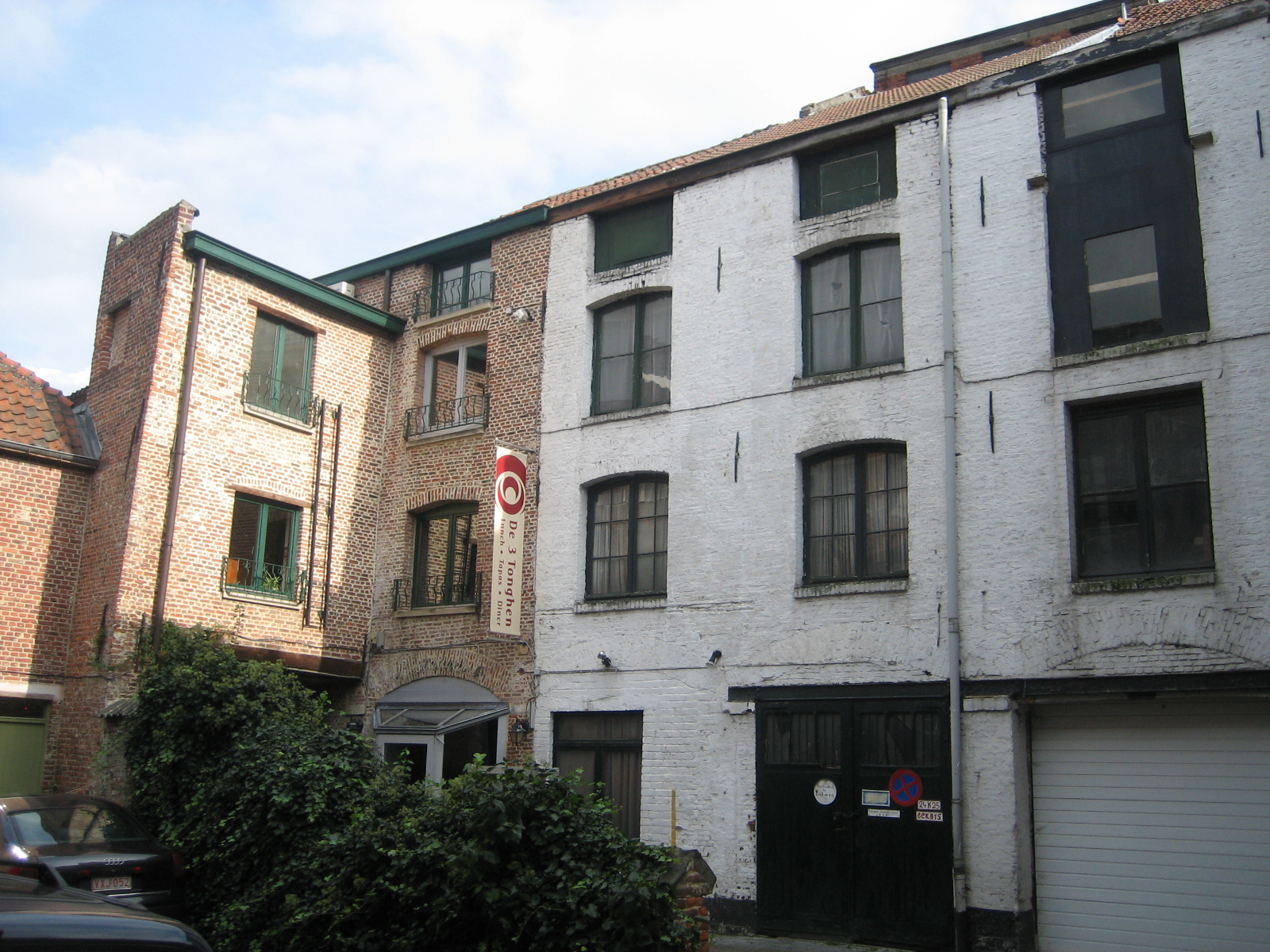 Gebai, wou fréier de Collegium Trilingue dra war, am Busleidengang zu Léiwen. Oktober 2007.